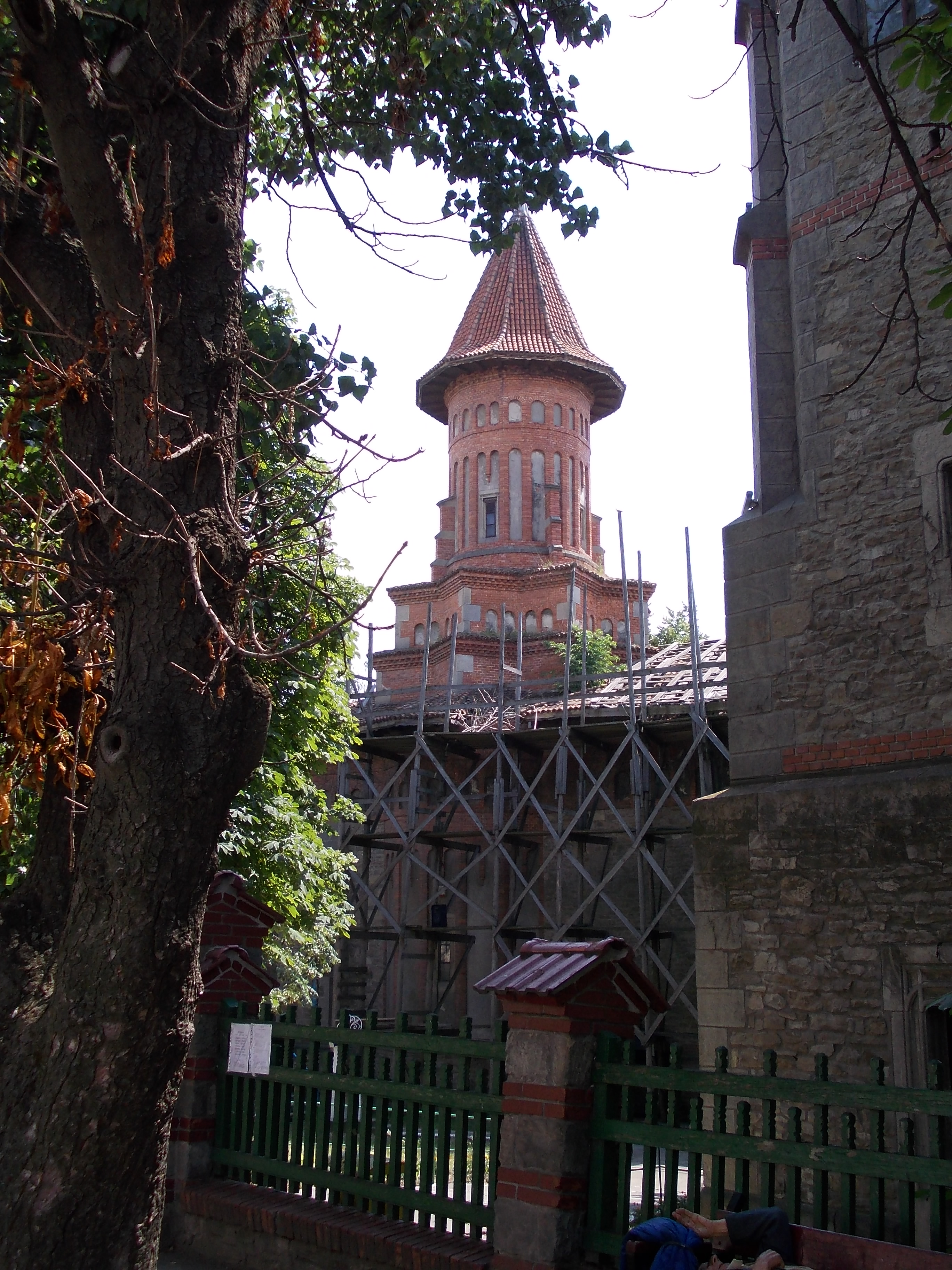 Biserica Sf Gheorghe Botoşani 01